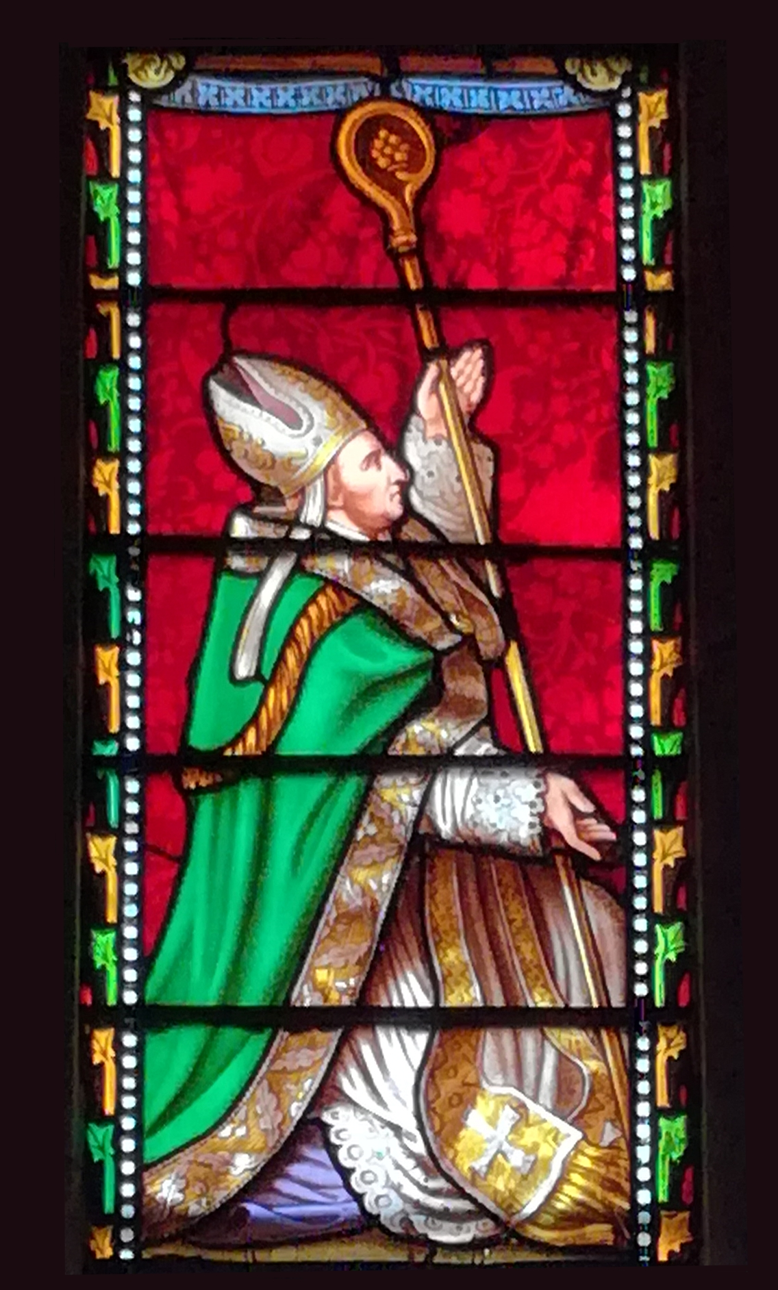 Vitrail de l'église Notre-Dame de Lescure (Valuéjols, Cantal, France). Consécration du sanctuaire de Notre-Dame de Lescure par Mgr Pierre-Antoine-Marie Lamouroux de Pompignac, évêque de Saint-Flour (détail).